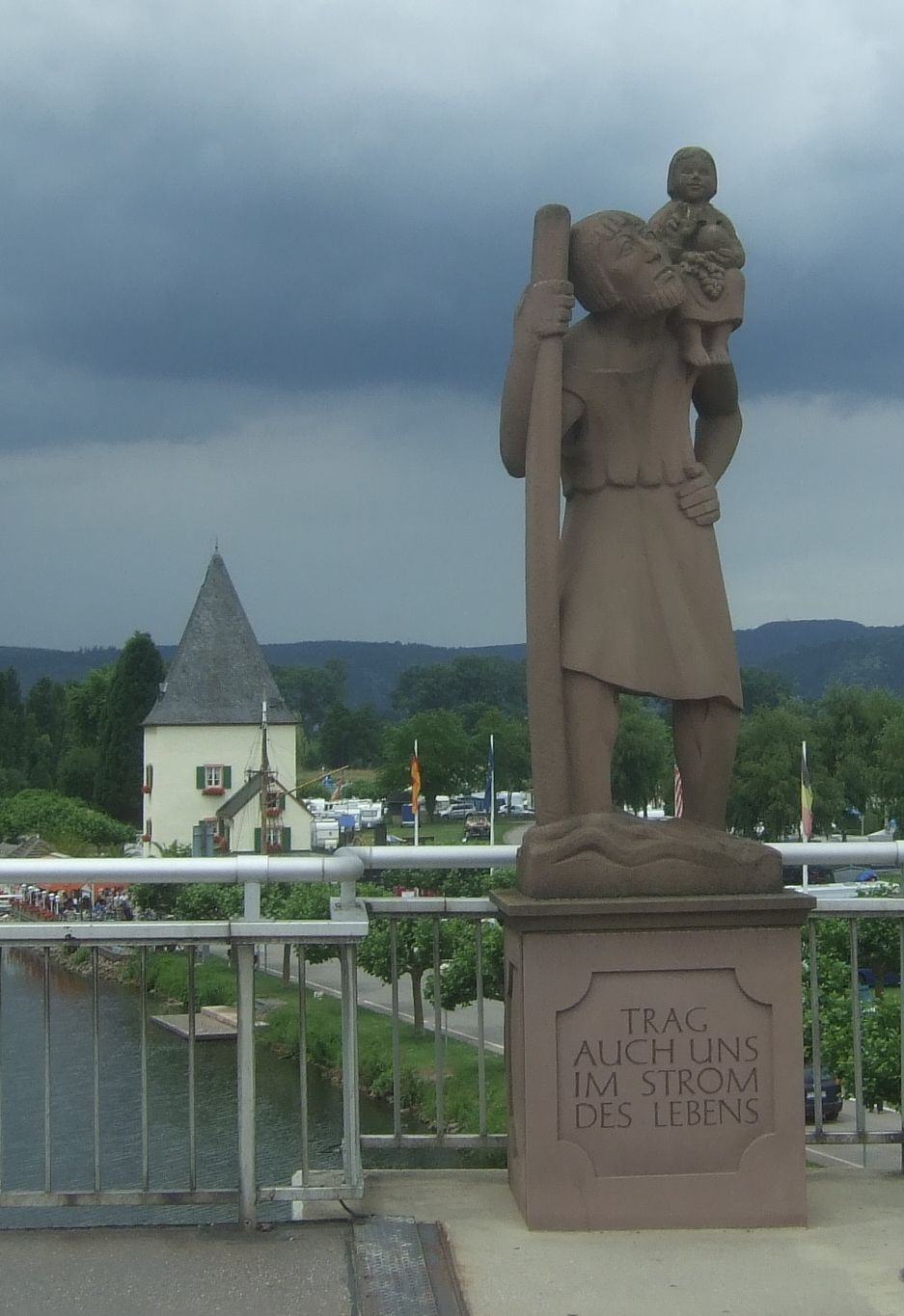 Christophorus-Skulptur an der Moselbrücke/L141 in Schweich